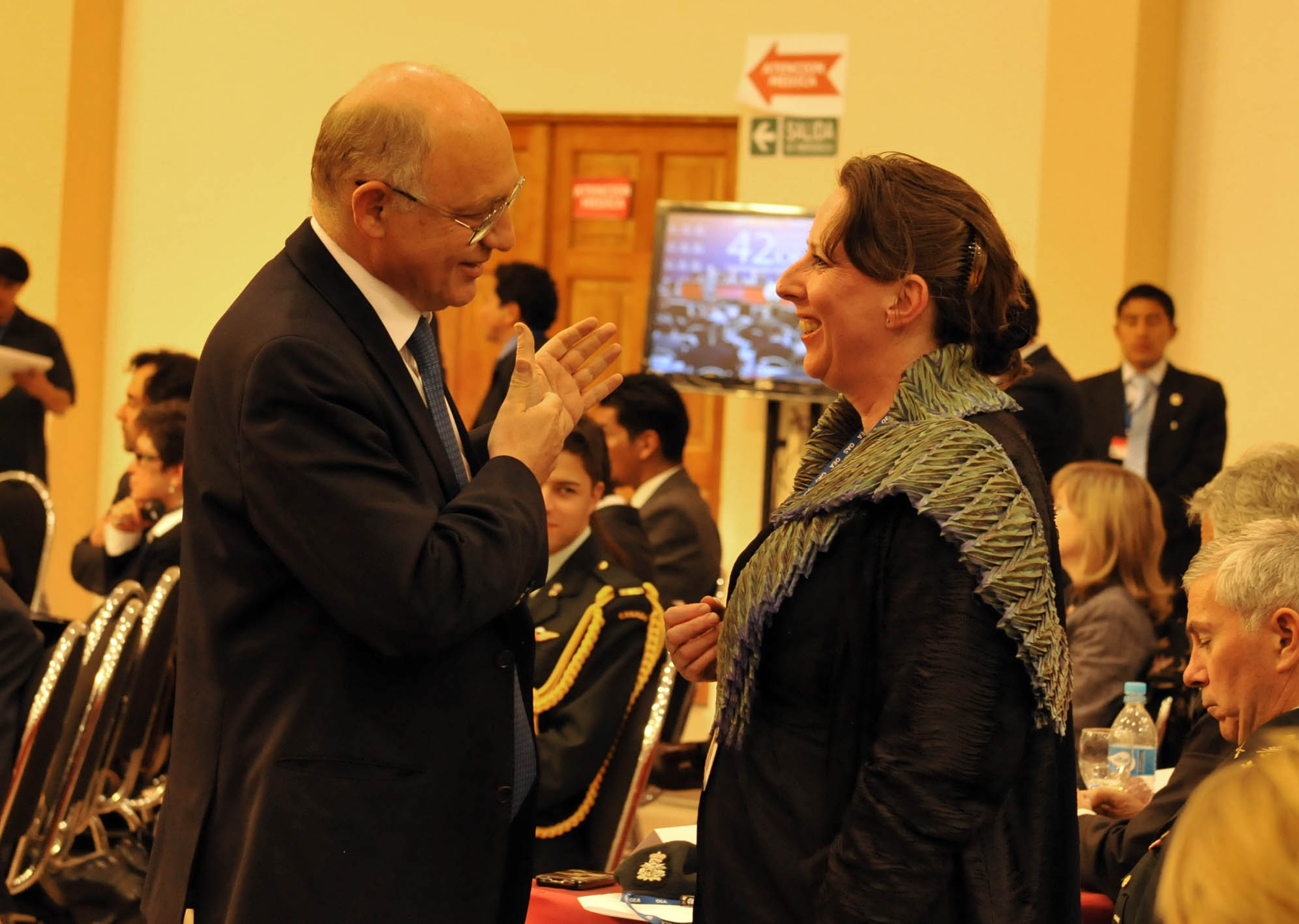 El Canciller Timerman se acerca a la Delegada británica en la Asamblea General de la OEA de Cochabamba, Fiona Clouder, y le invita a comenzar las negociaciones de acuerdo al mandato de la ONU. La Delegada Clouder manifestó, por su parte, que no tenía autorización pero que iba a transmitir el mensaje argentino.